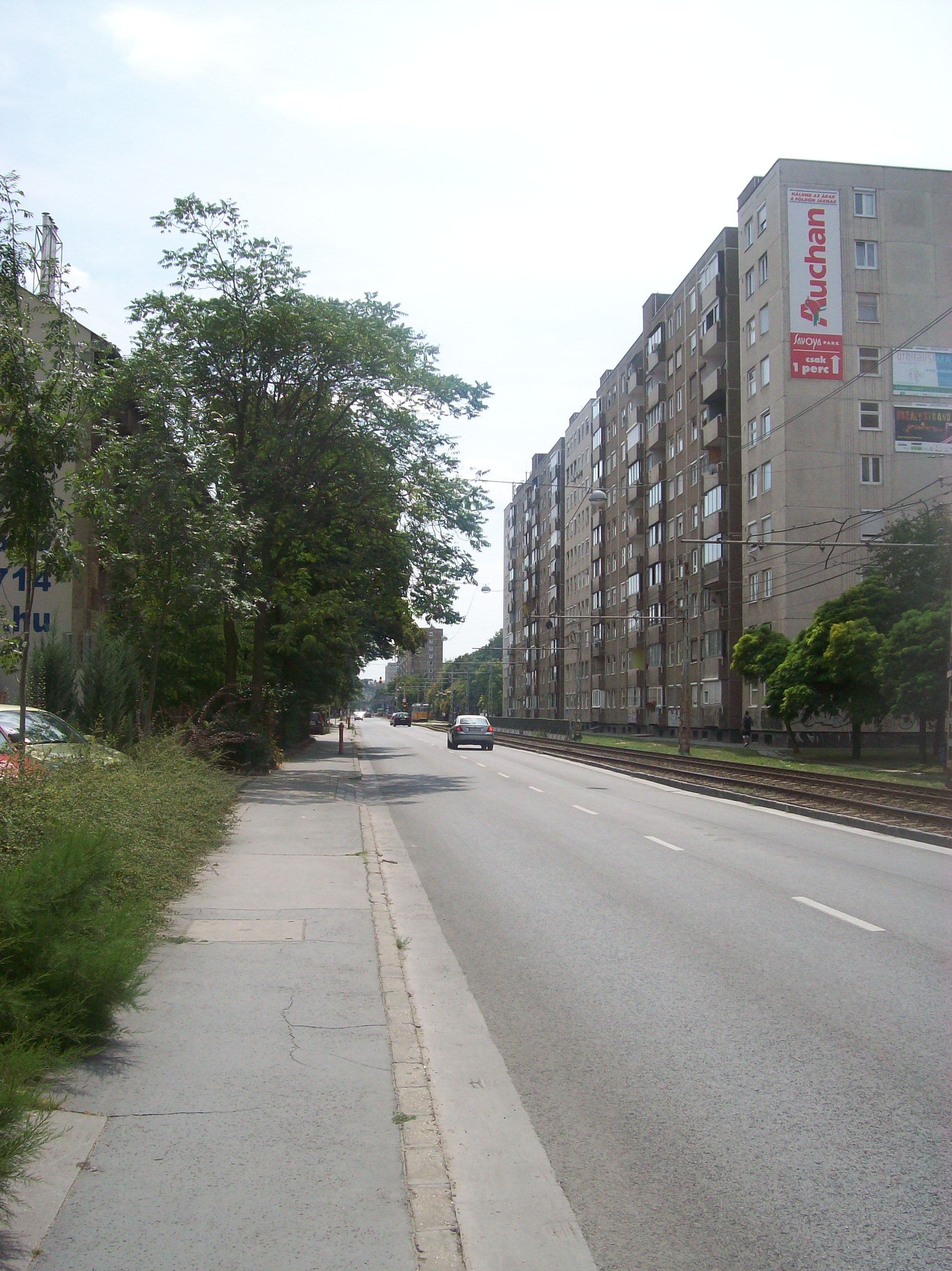 A budapesti Fehérvári út Albertfalvánál (Kondorosi út és Építész utca közötti szakasz)